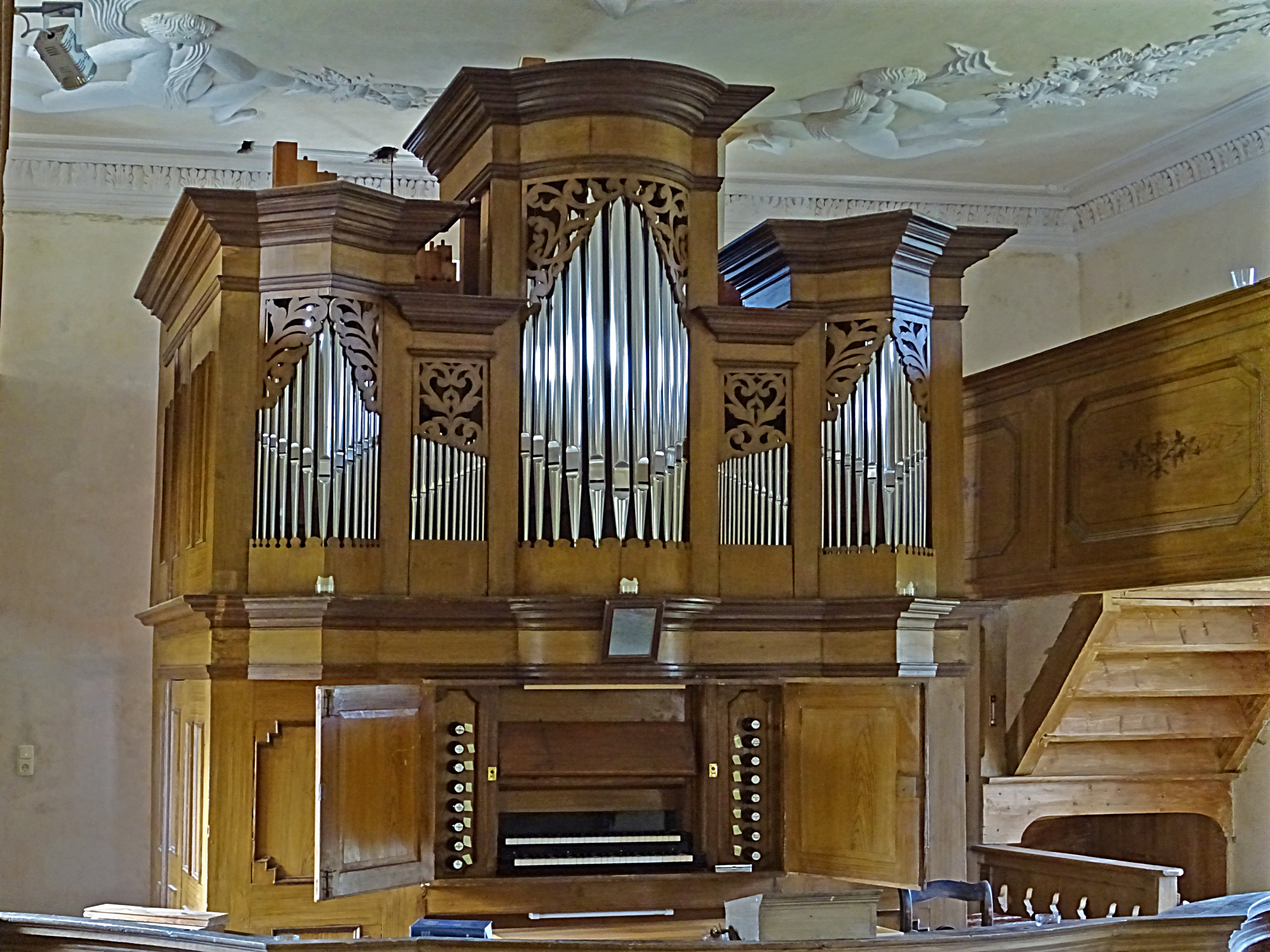 Orgel von Johann Georg Fincke (1745, II/P13) in der Dorfkirche Kopitzsch[1]